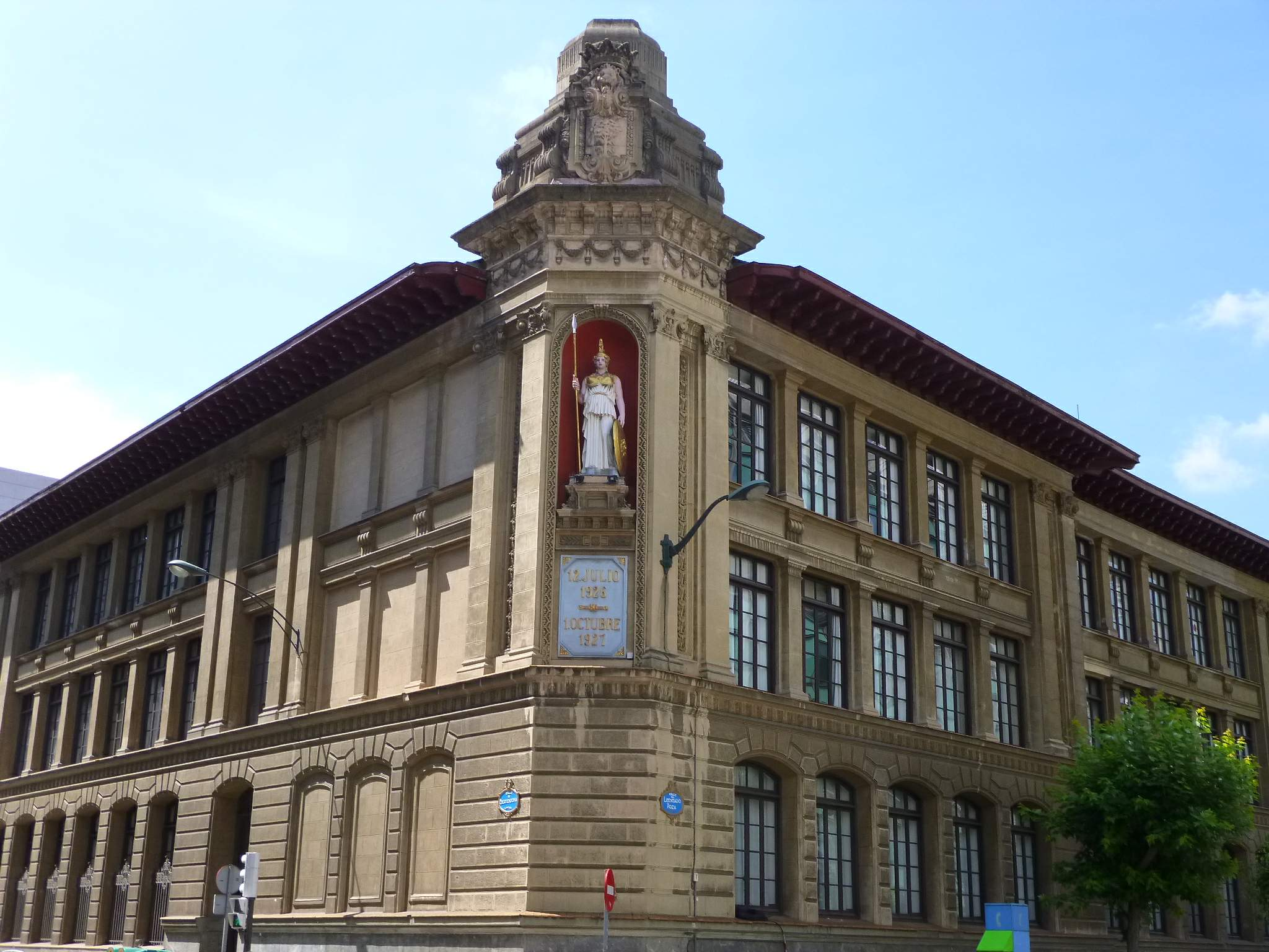 Instituto de Educación Secundaria Miguel de Unamuno (Bilbao)